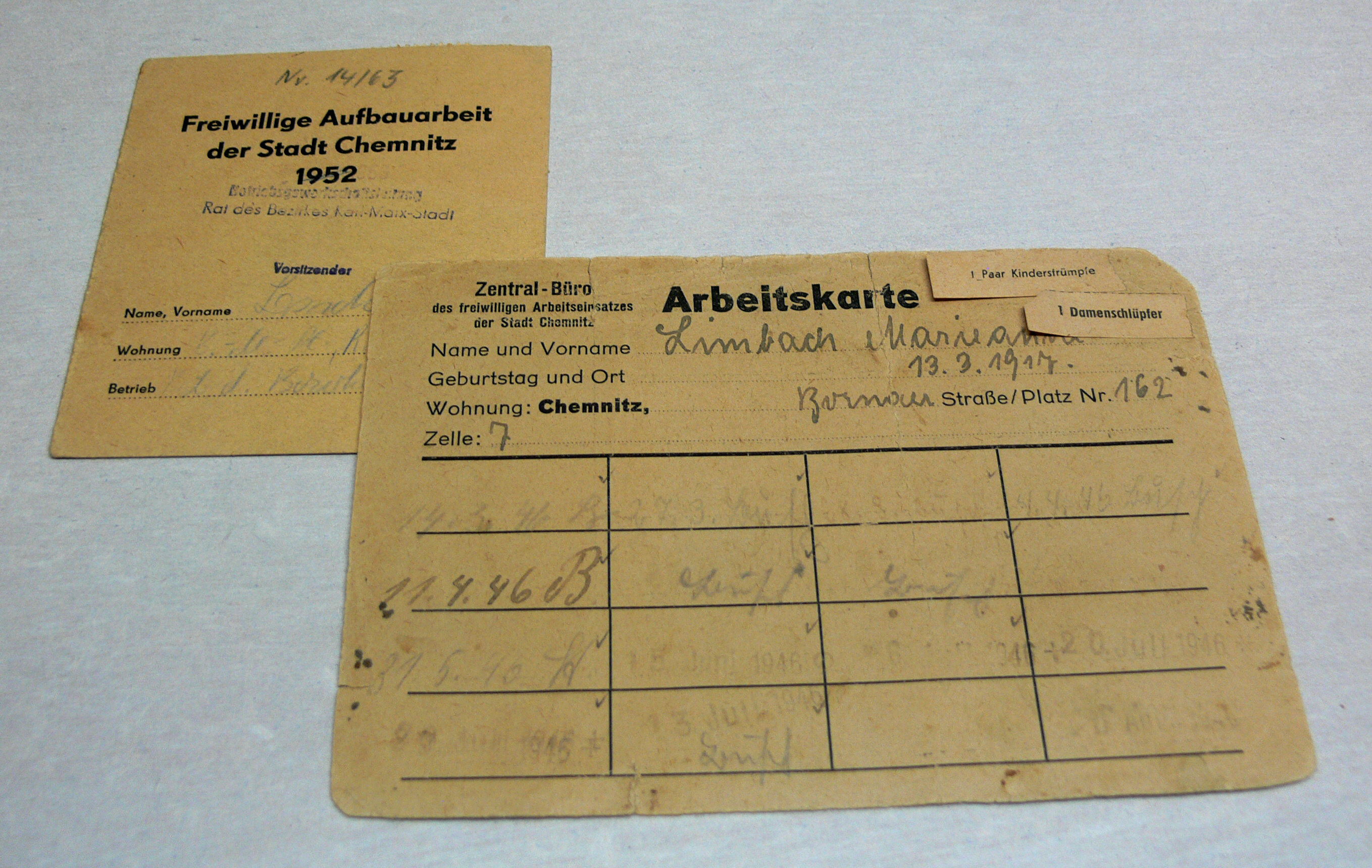 Freiwillige Aufbauarbeit der Stadt Chemnitz 1952, Arbeitskarte Schloßbergmuseum Chemnitz, Bildersaal Chemnitzer Geschichte